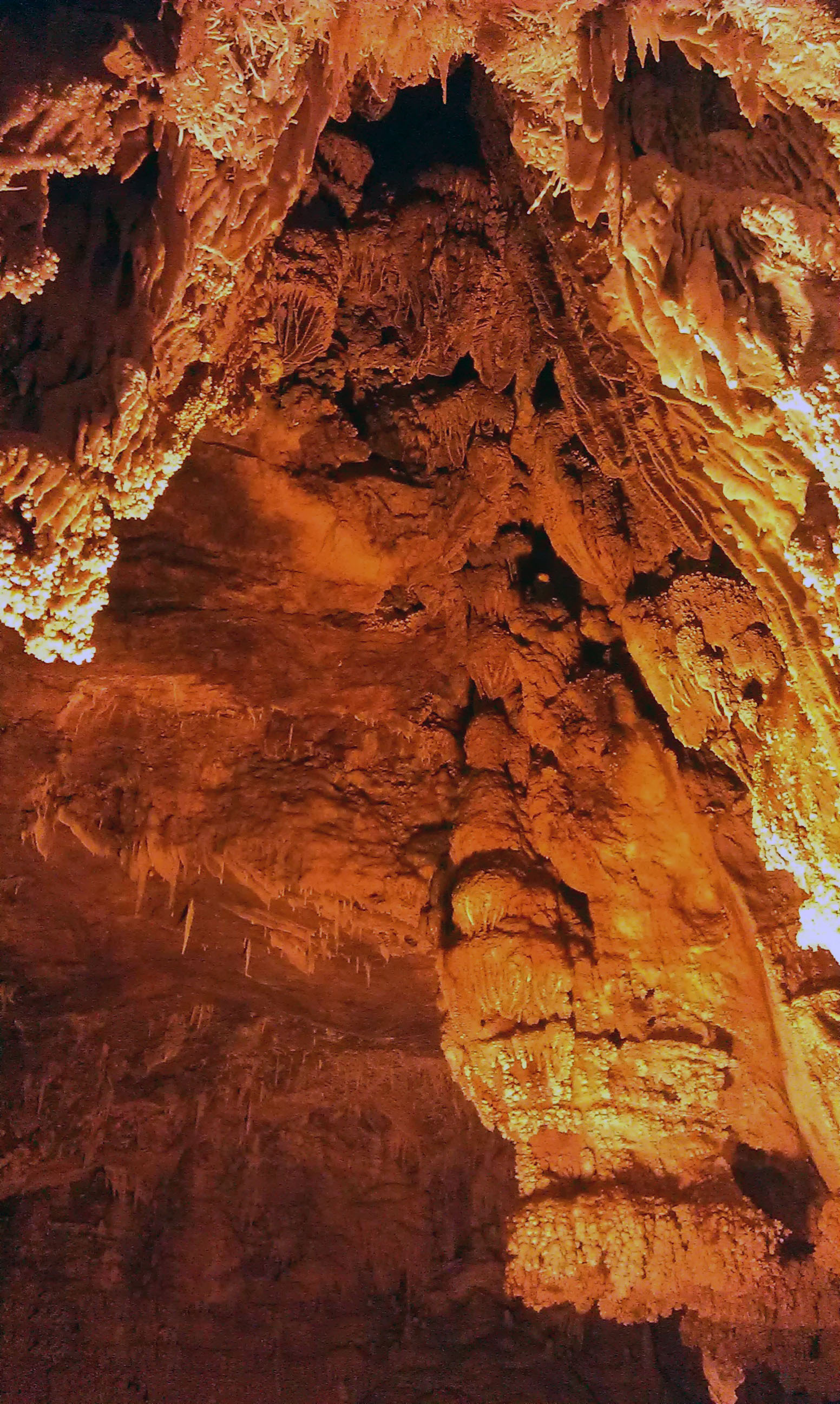 غار علیصدر